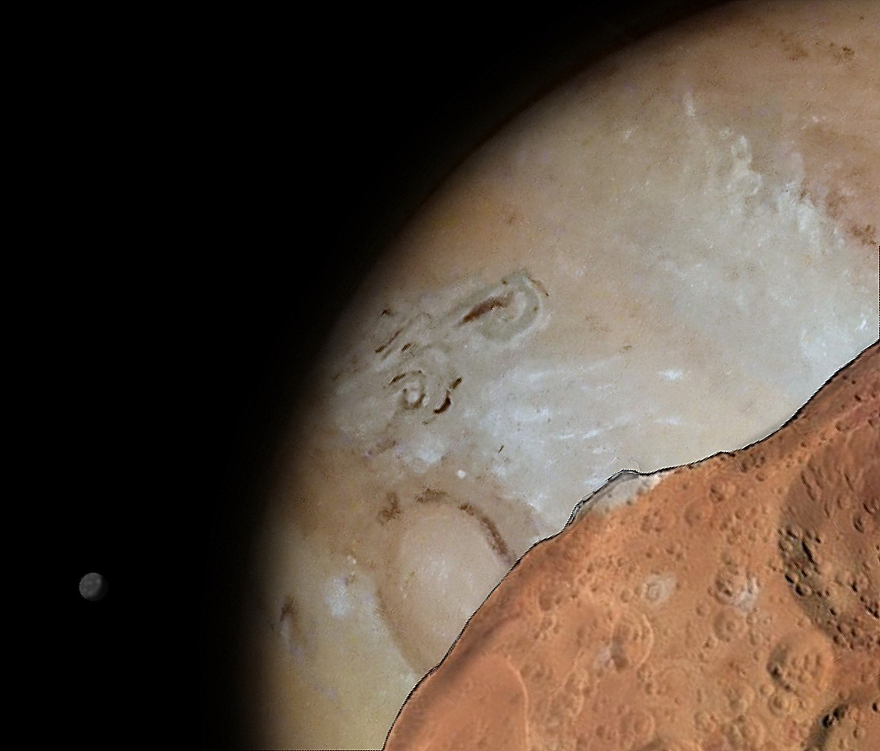 Jupiter von Amalthea aus gesehen